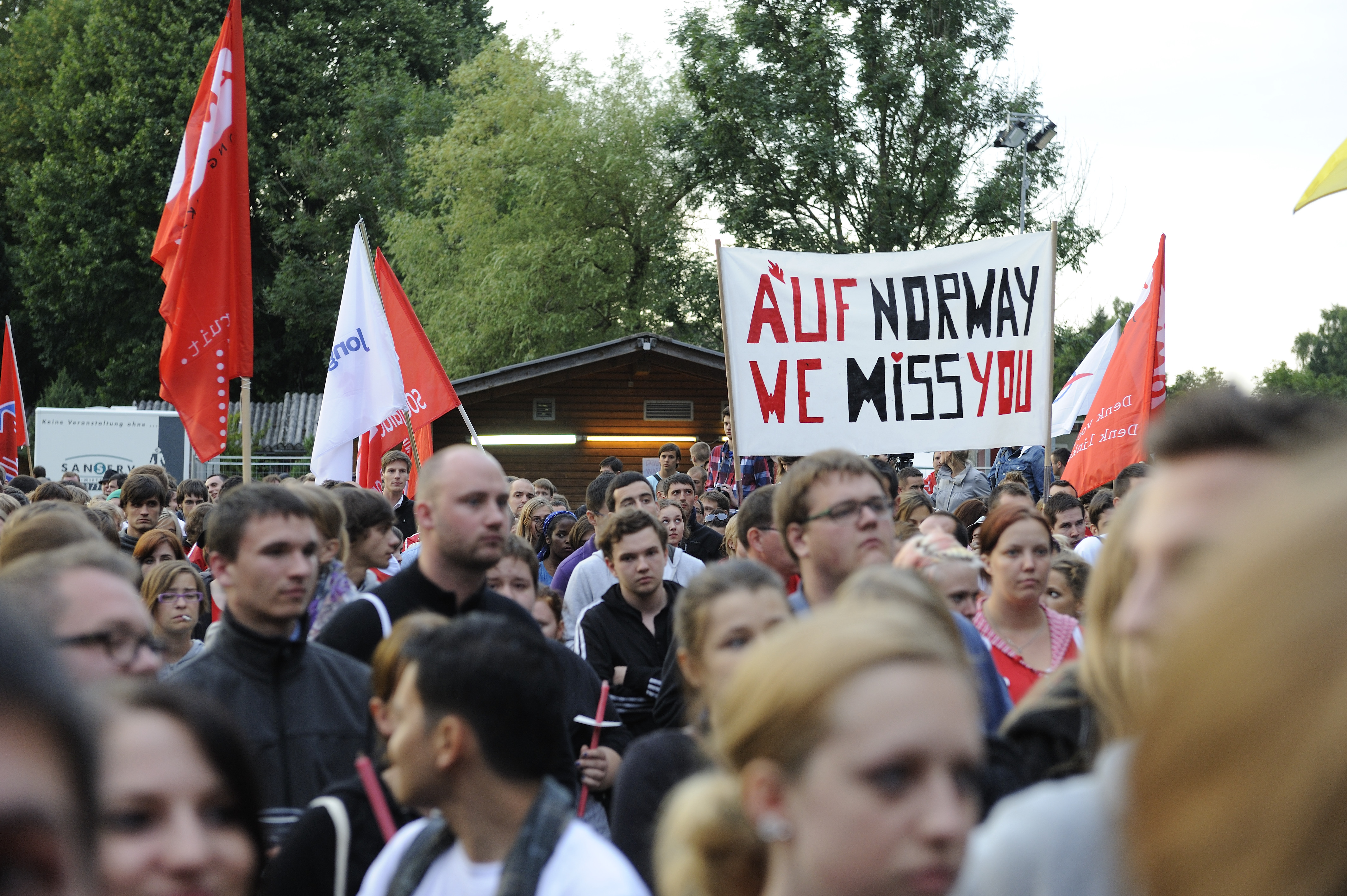 Bundeskanzler Werner Faymann besucht die Eröffnung des IUSY Worldfestival im Europacamp in Weißenbach am Attersee. Weißenbach, 25.07.2011, Copyright Thomas Jantzen / SPÖ